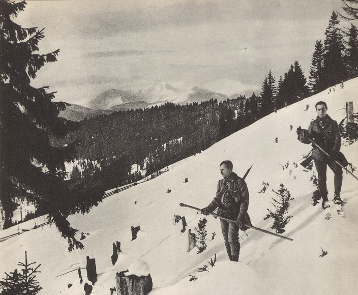 Patrol telefoniczny Legionów Polskich na nartach. Kirlibaba, styczeń 1915.